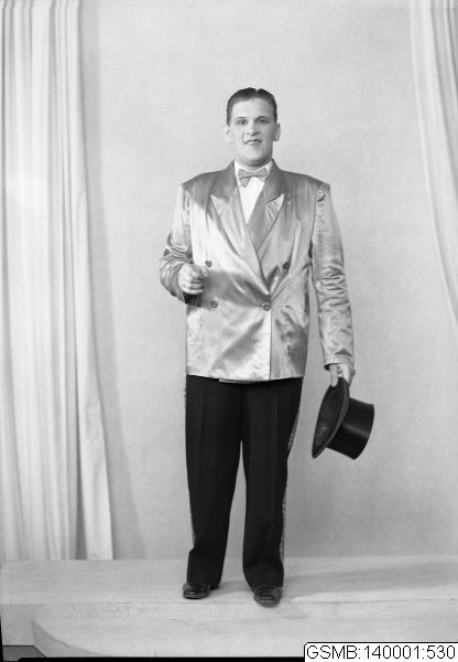 Sten-Åke Cederhök (1913-1990) in the play Lustiga tåget